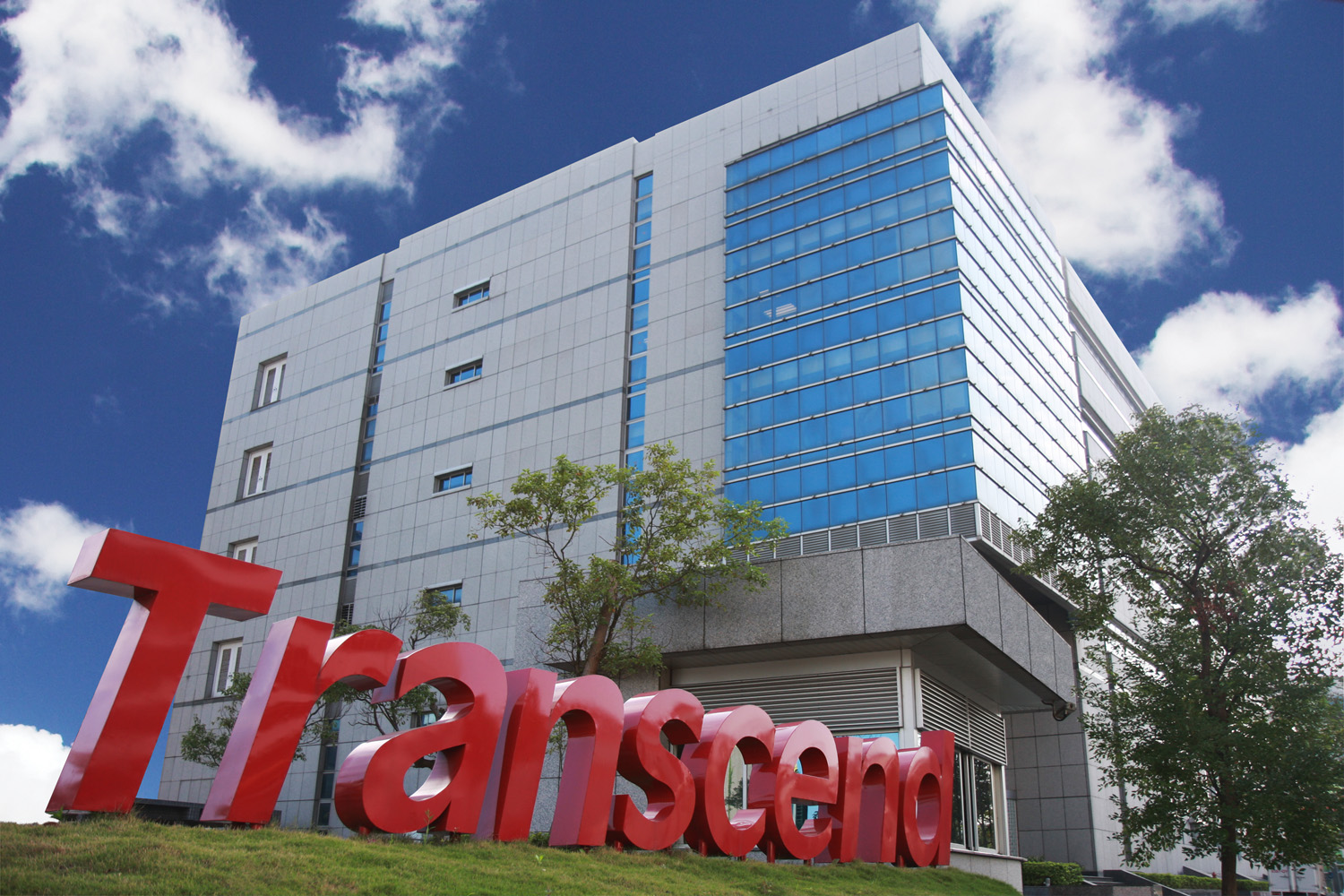 創見資訊總部，位於臺北市內湖區行忠路70號。